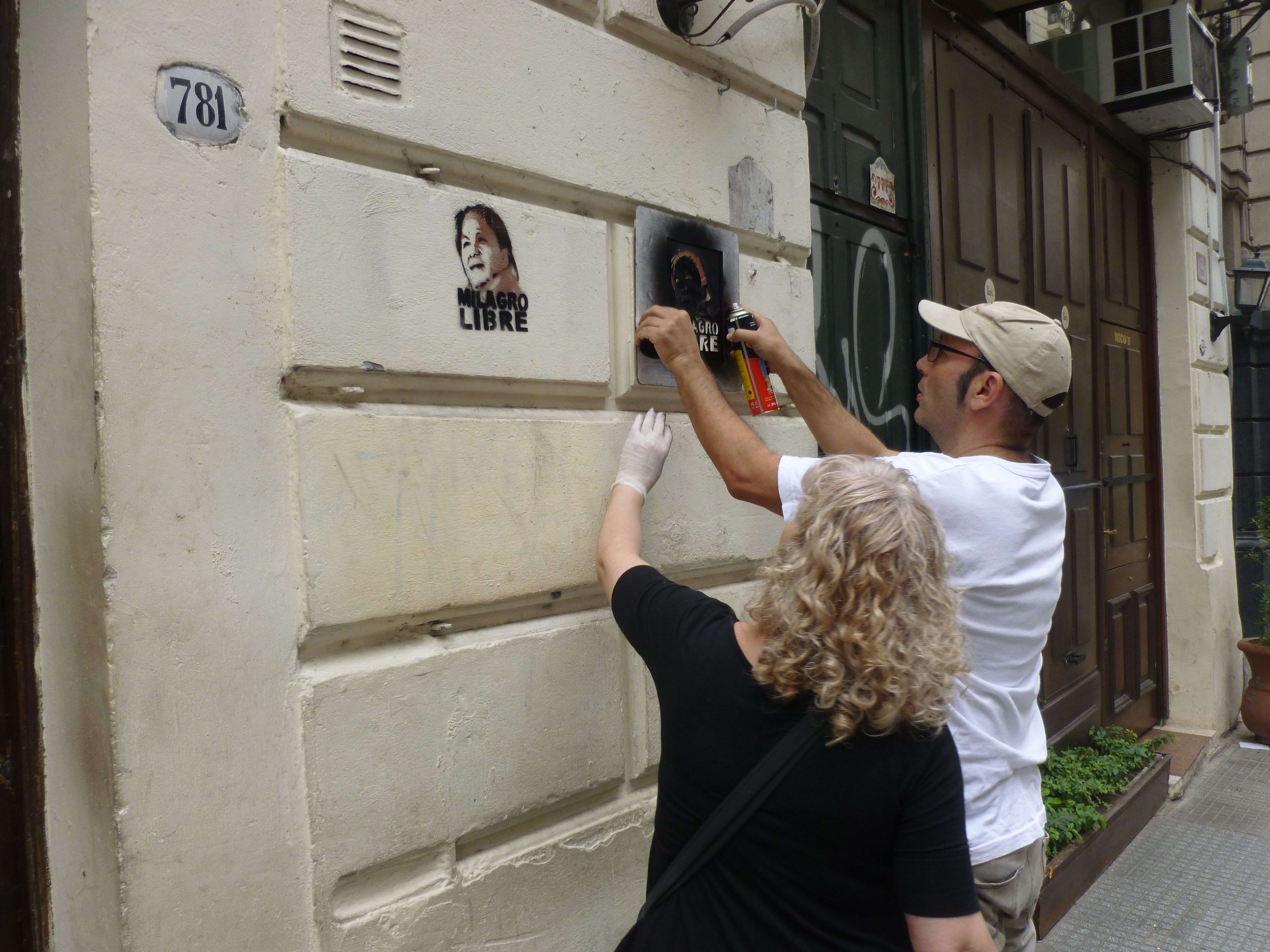 "Libertad a MIlagro". Reclamo por la libertad de Milagro Sala. Buenos Aires. Argentina. Marcha del 24 de marzo de 2016.